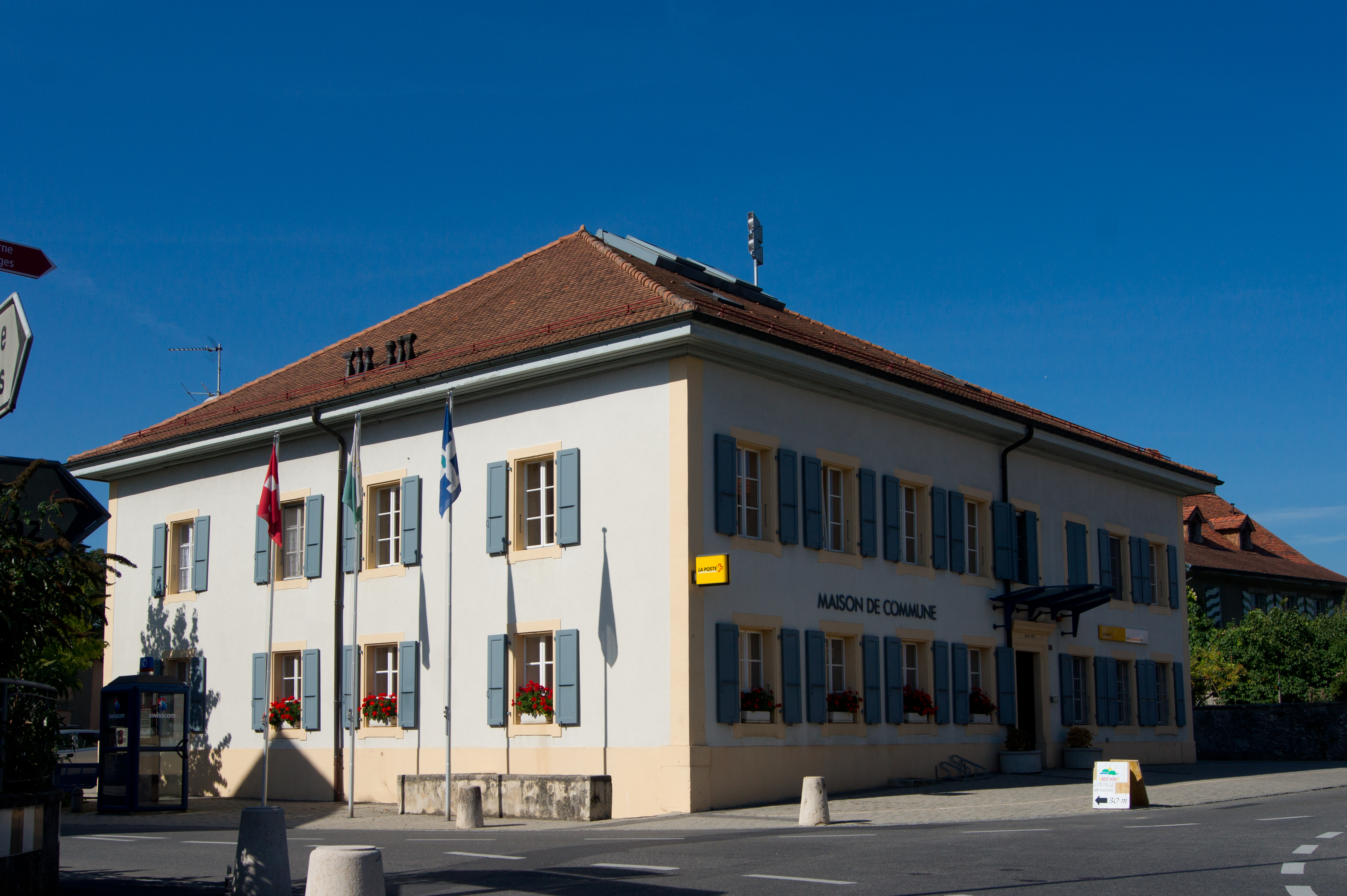 Maison de commune de Goumoens-la-Ville, canton de Vaud, Suisse.